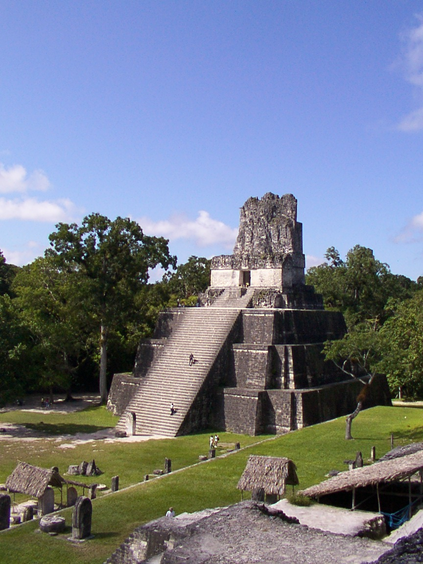 Maya Temple, Tikal, GuatemalaTemple II